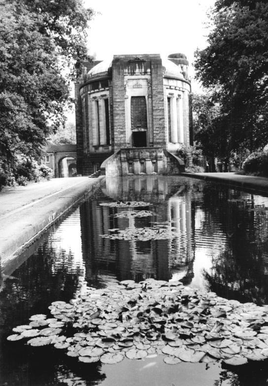 Dresden-Tolkewitz, Krematorium ADN-Häßler 15.5.1990-Dresden: 62 Politische Häftlinge wurden in der Zeit zwischen 1952 und 1960 nach ihrer Hinrichtung im ehemaligen Landgericht Dresden im Krematorium Dresden-Tolkewitz eingeäschert. Die Asche wurde in einer Wiese eingeharkt. Hier das Krematorium.